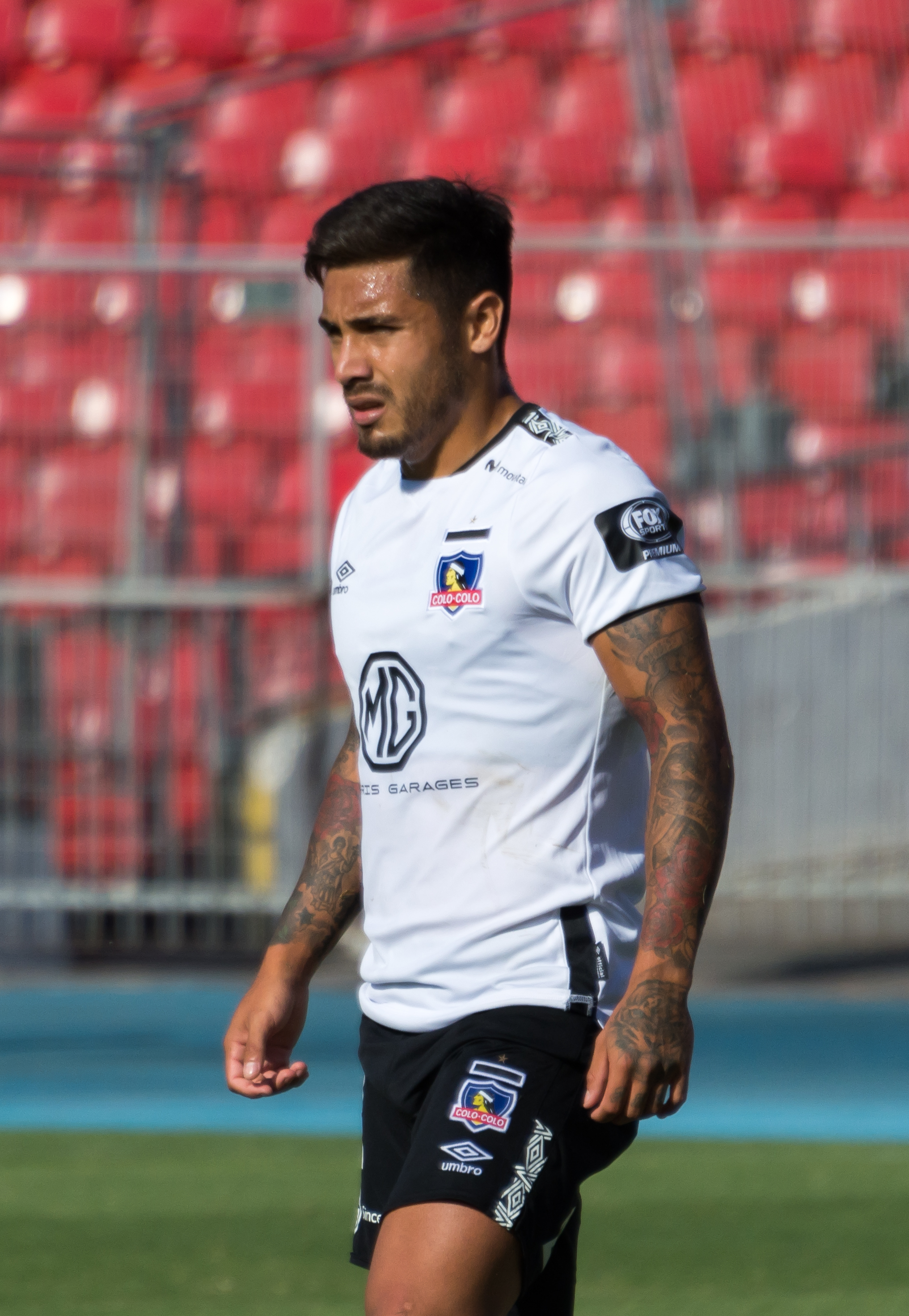 Audax Italiano v Colo-Colo, Estadio Nacional, Ñuñoa, Santiago, Región Metropolitana, Chile